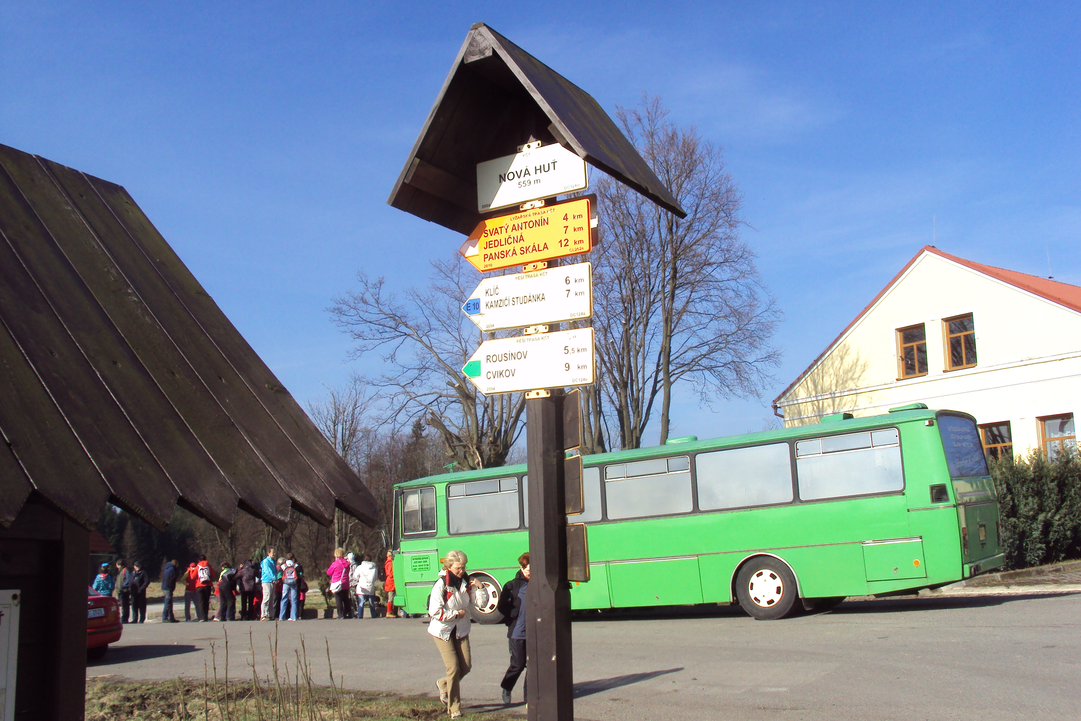 Rozcestník před samotou Nová Huť v Lužických horách